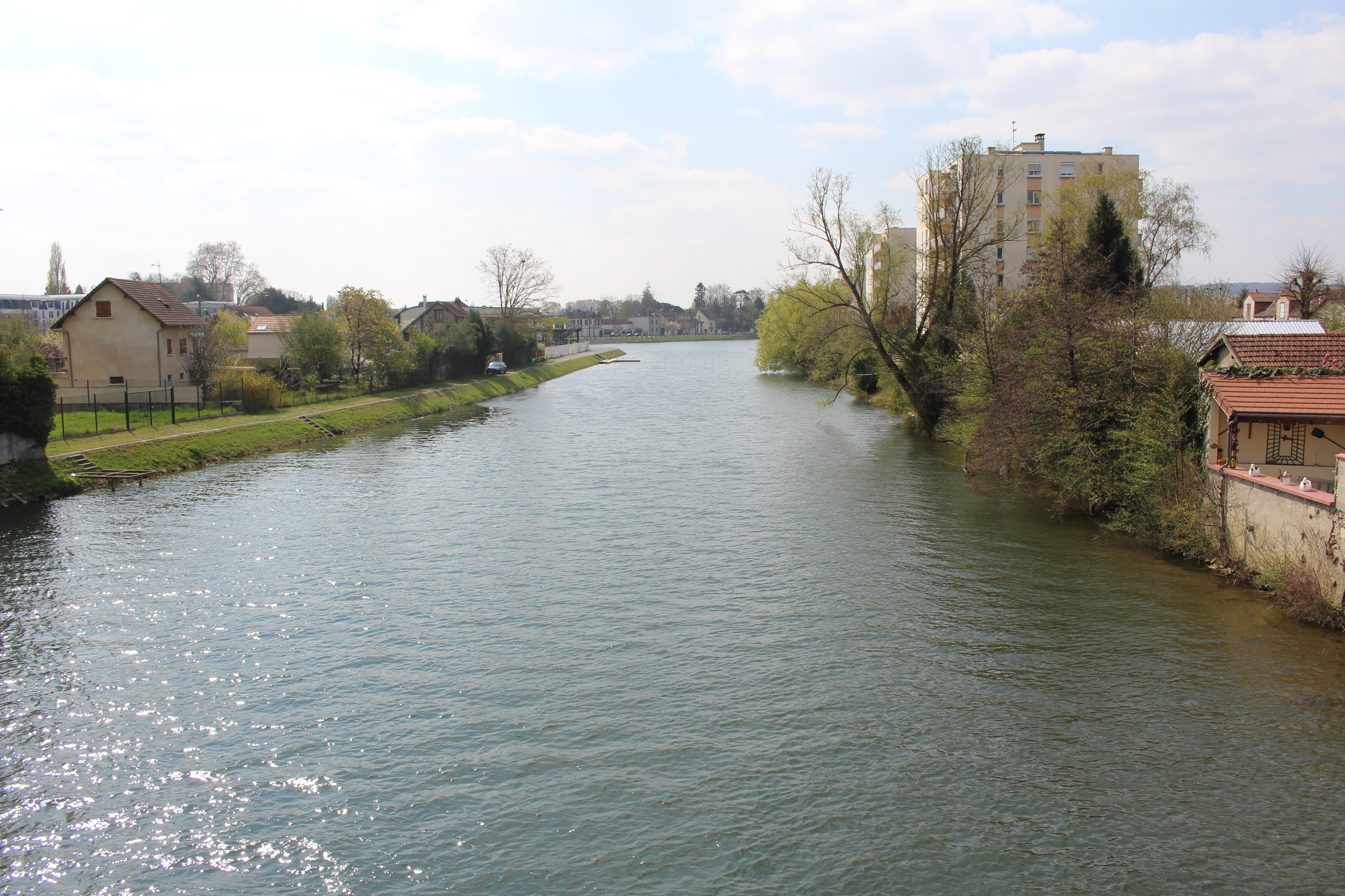 La rivière Yonne près de l'île d'Yonne à Sens.